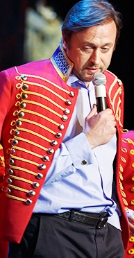 Закутский Валерий Владимирович (род. 1970) - российский шоумен